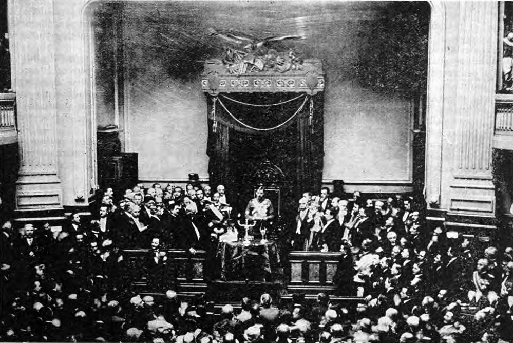 Jurământului Regelui Carol al II-lea în fața Adunării Constituante din 8 iunie 1930